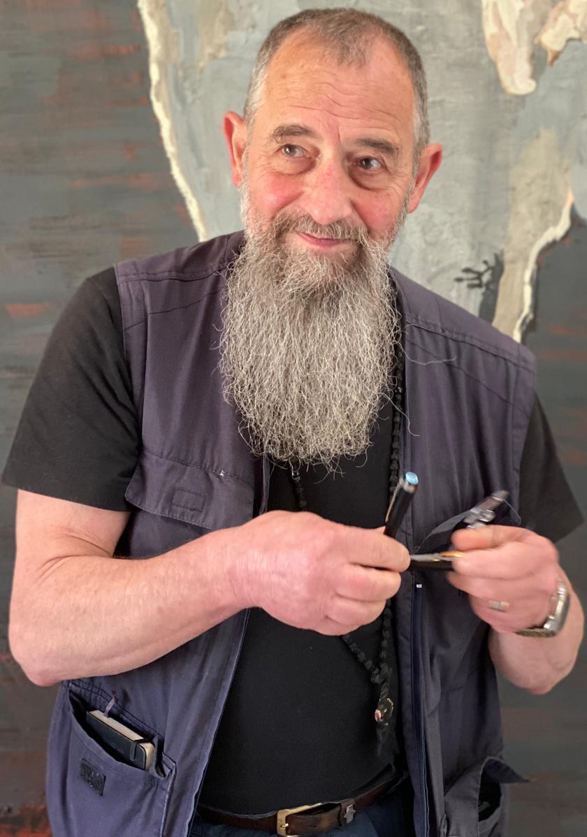 the Swiss painter Samuele Gabai in his atelier in Vacallo